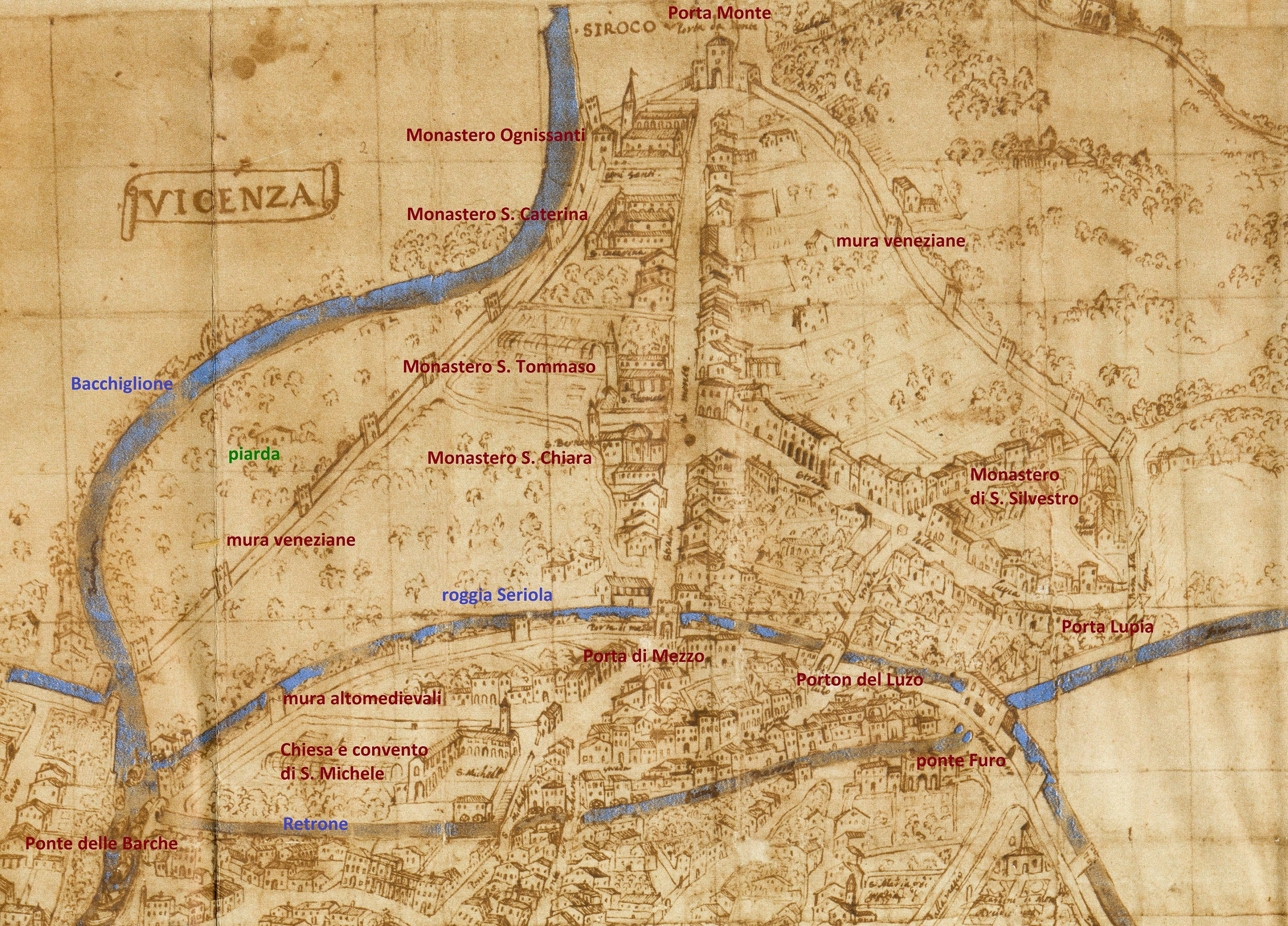 Vicenza - Pianta Angelica 1580 - particolare del Borgo Berga